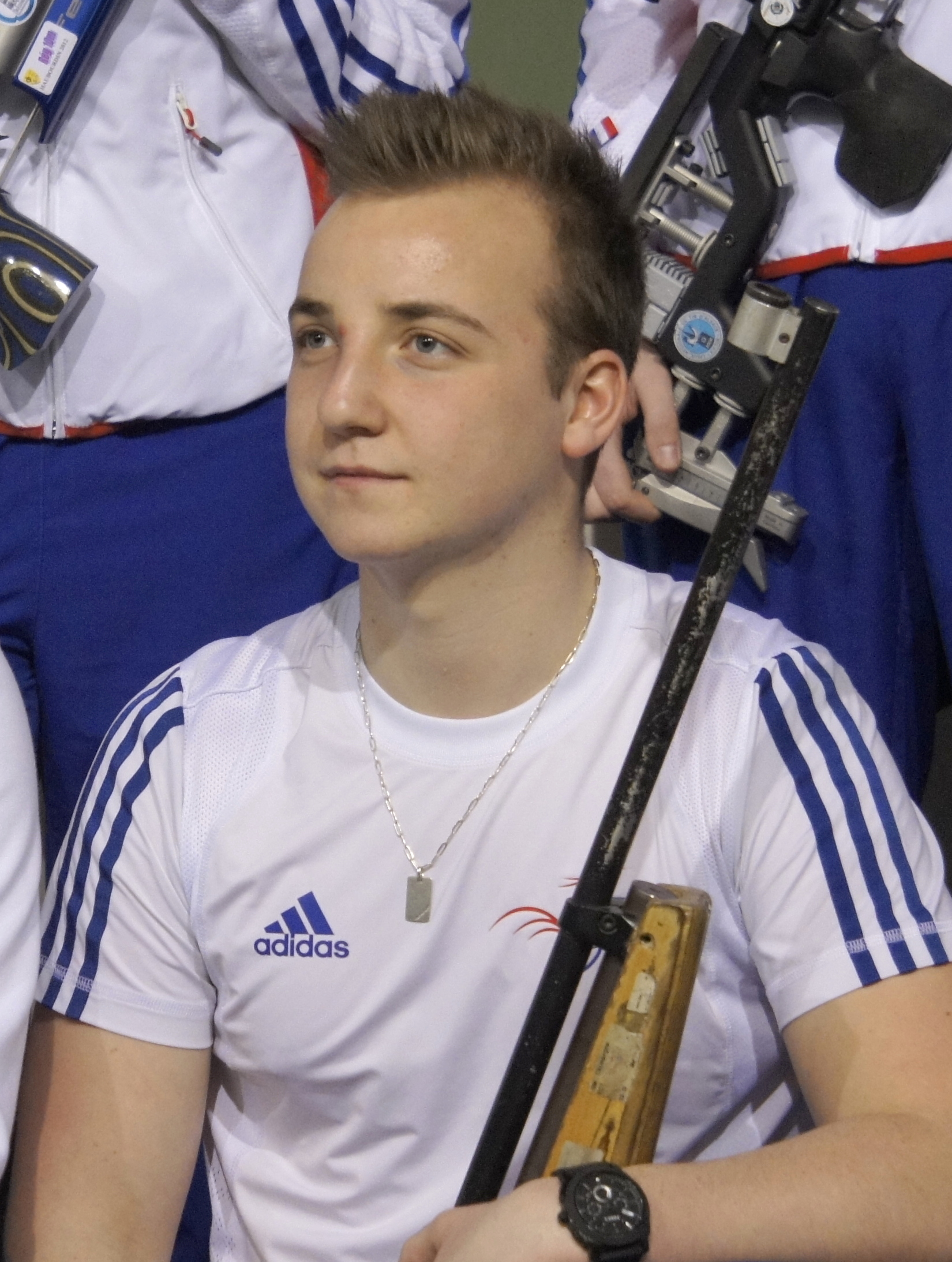 Championnat de France 2013 à Reims .